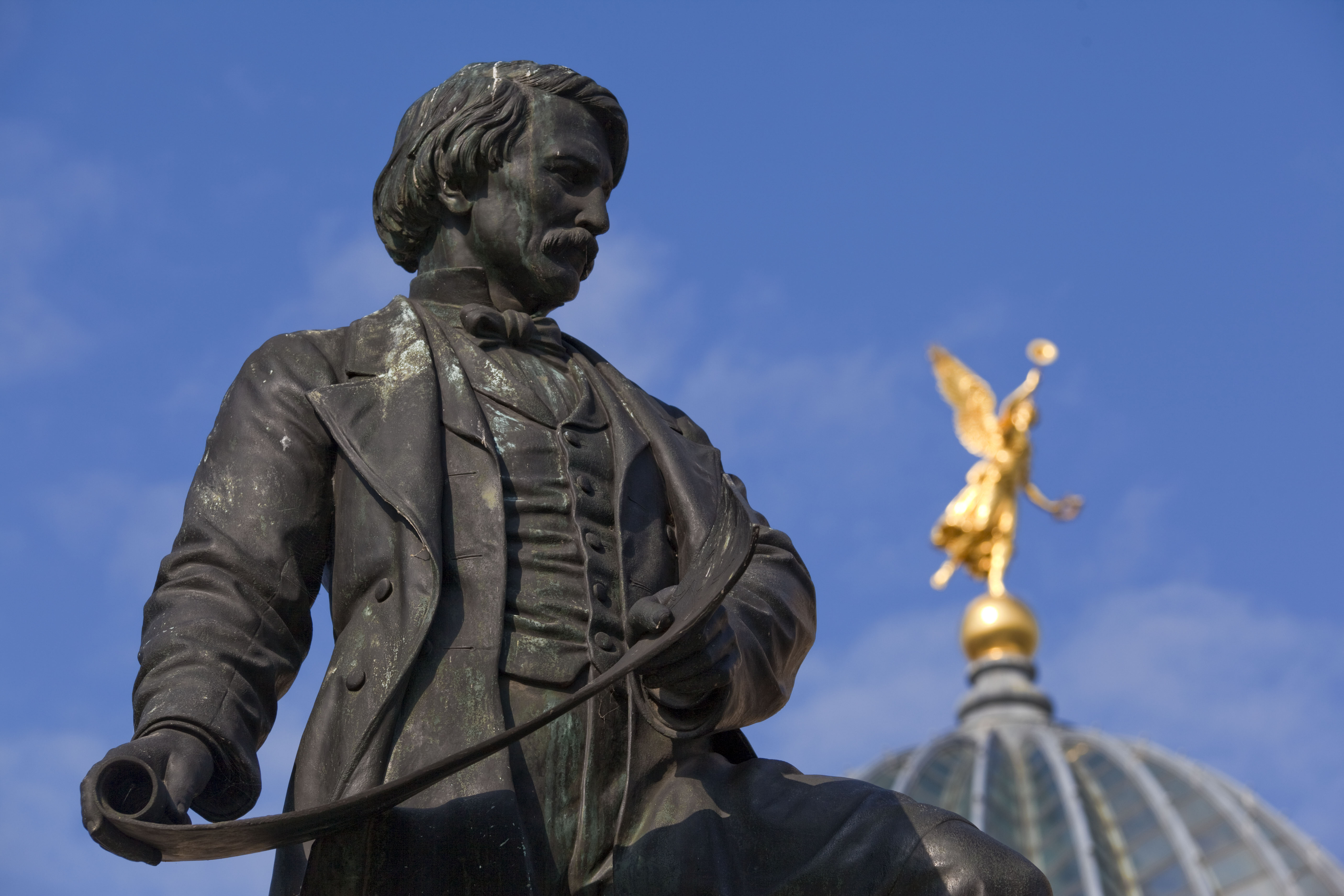 Denkmal Sempers auf der Brühlschen Terrasse in Dresden